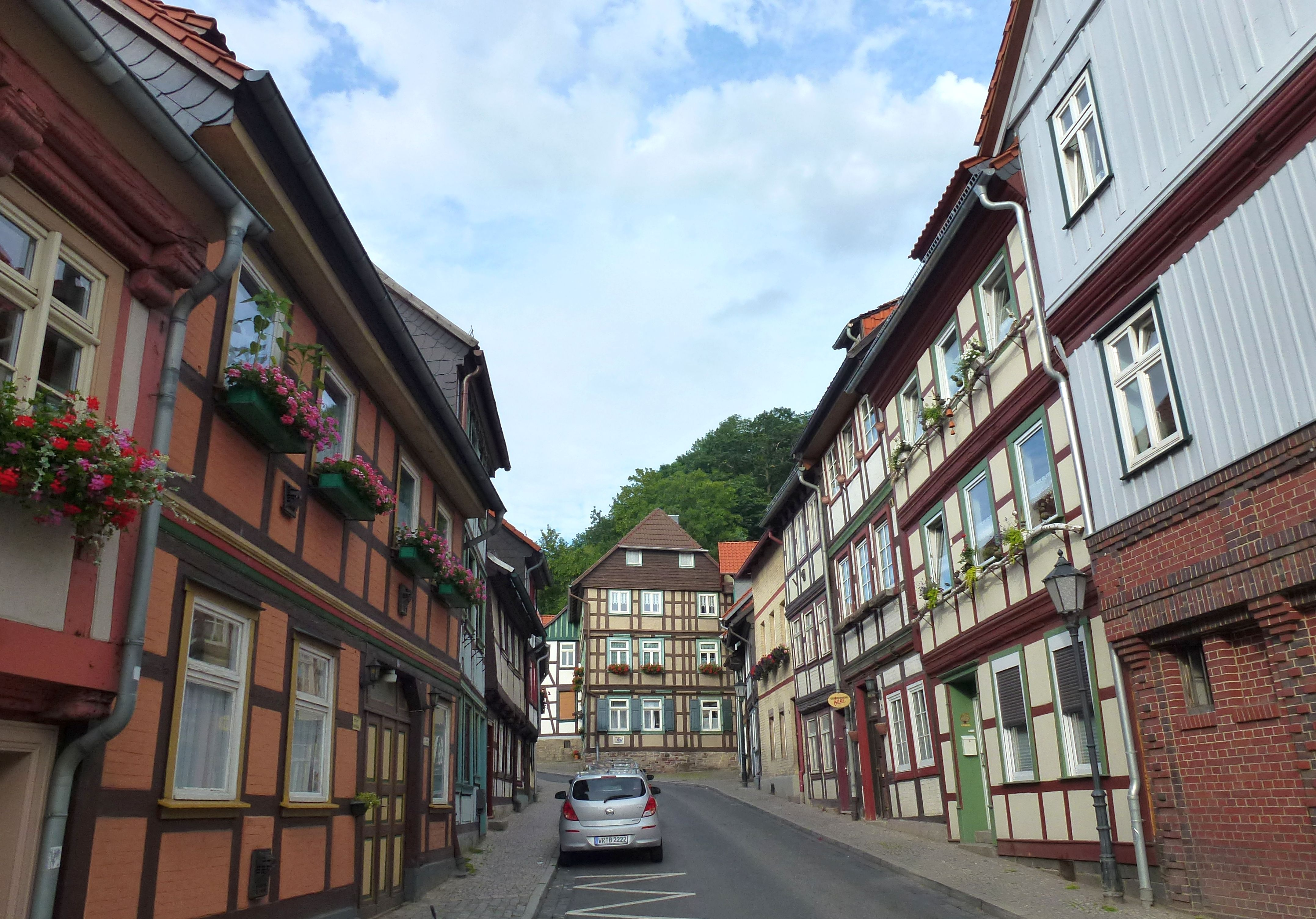 Unterer Burgberg in Wernigerode